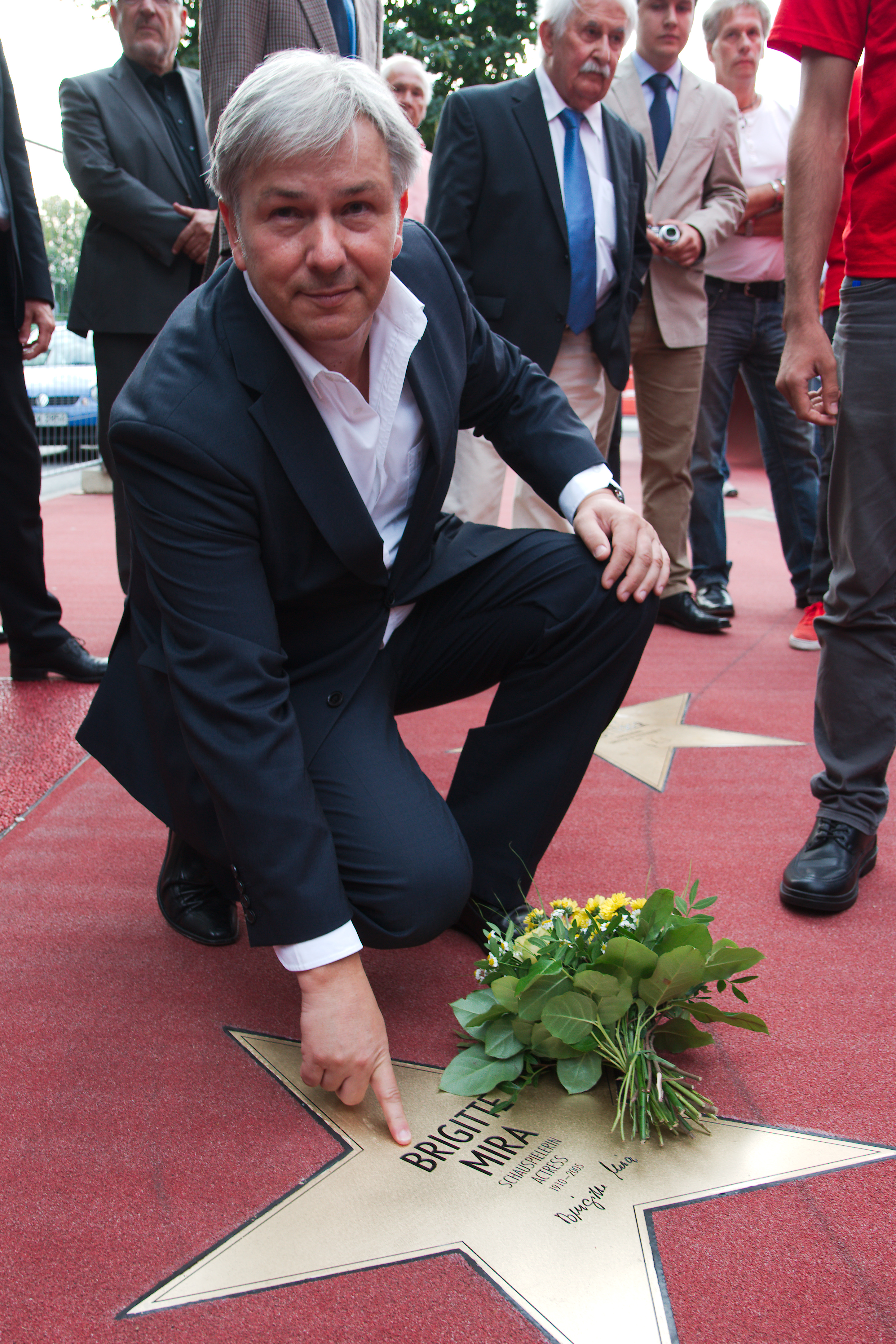 Den Stern weiht Klaus Wowereit ein.